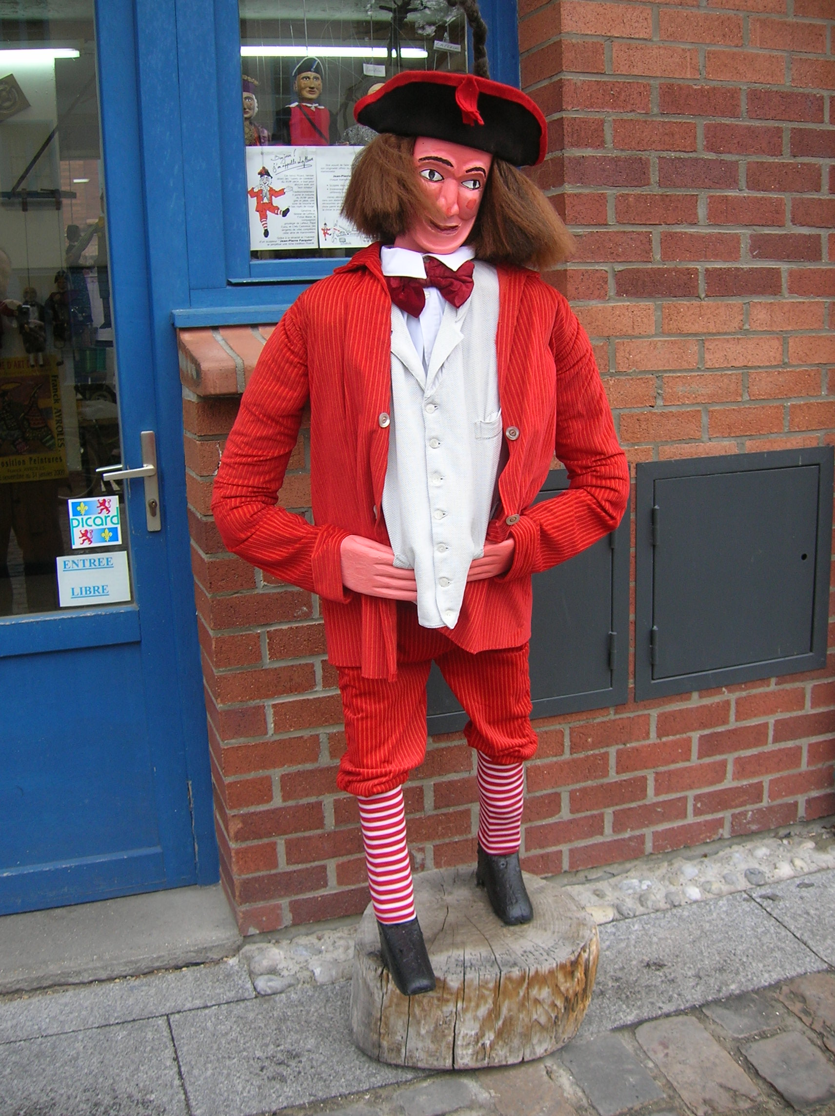 Lafleur devant l'atelier de Jean-Pierre Facquier ("intailleu d'cabotans") dans une rue d'Amiens.